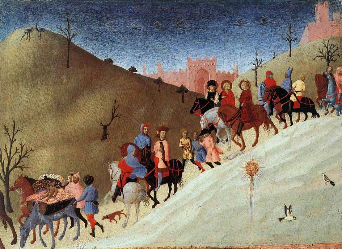 Fragment eines Bildes mit der Anbetung der Heiligen Drei Könige